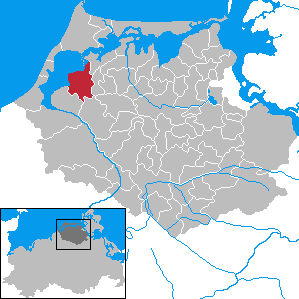 Saal in Mecklenburg-Vorpommern - District Nordvorpommern